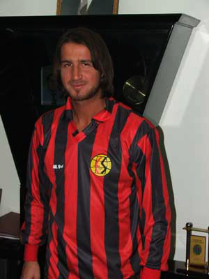 Bei der Vertragsunterzeichung in der Saison 2005-2006.